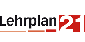 Logo Lehrplan 21 der Deutschschweizer Erziehungsdirektoren-Konferenz (D-EDK)